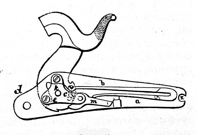 Это изображение было использовано для иллюстрирования статьи «Замок (часть огнестрельного оружия)» опубликованной в десятом томе «Военной энциклопедии», который был издан книгоиздательским товариществом И. Д. Сытина в 1912—1913 гг. в столице Российской империи городе Санкт-Петербурге.